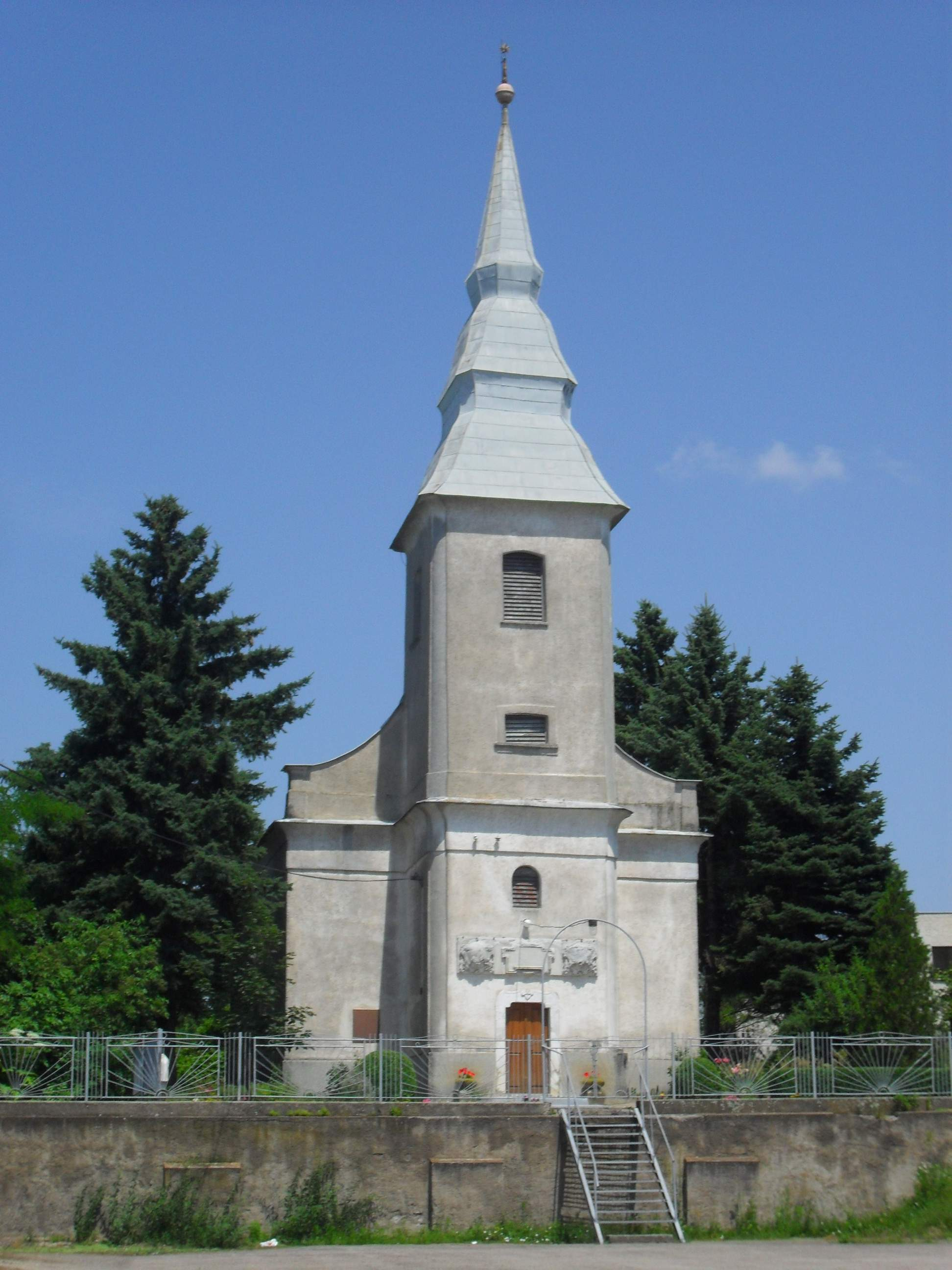 Szomotor - református templom